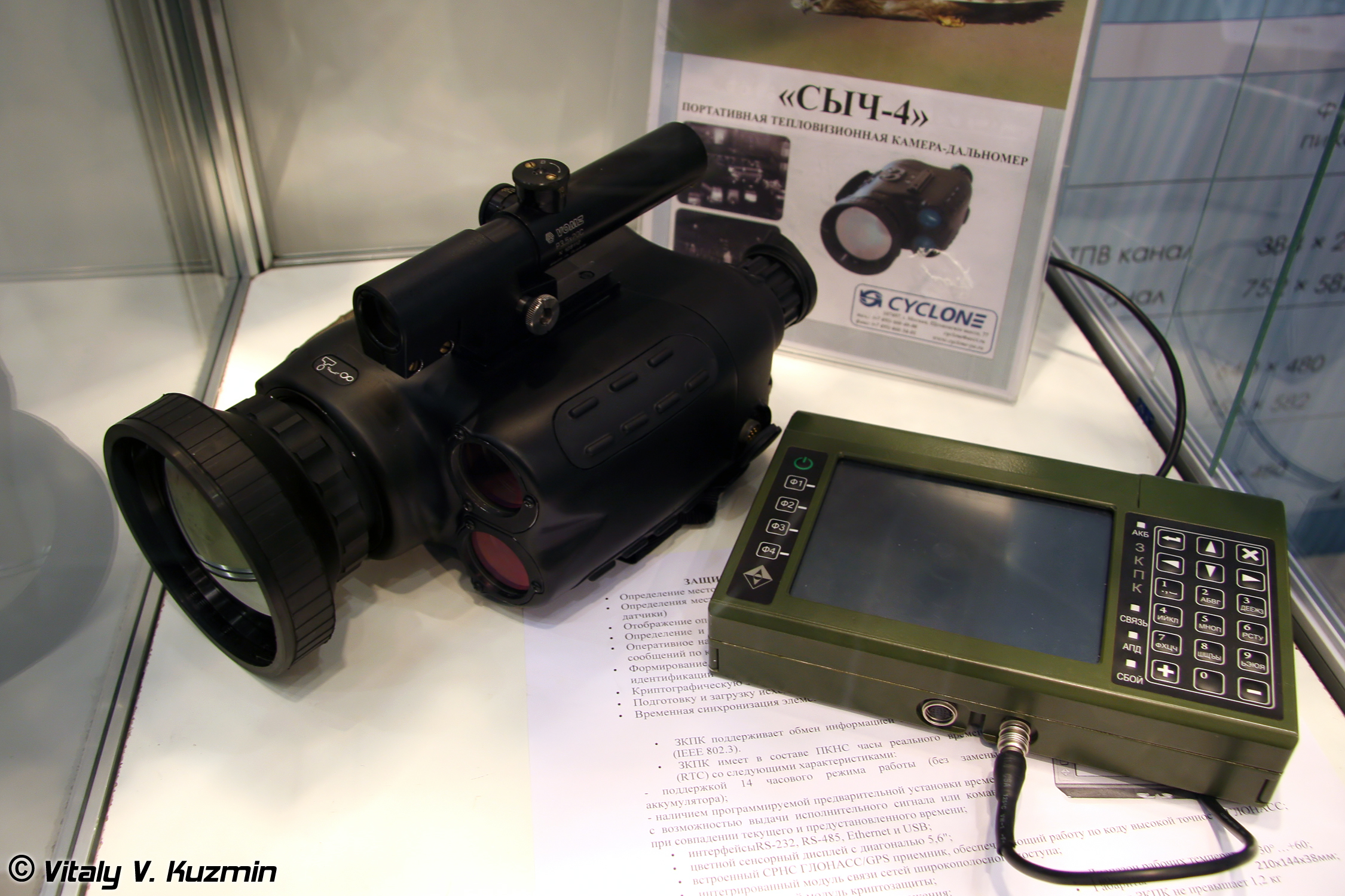 Тепловизионная камера-дальномер Сыч-4 (Sych-4 thermal imaging camera-rangefinder)